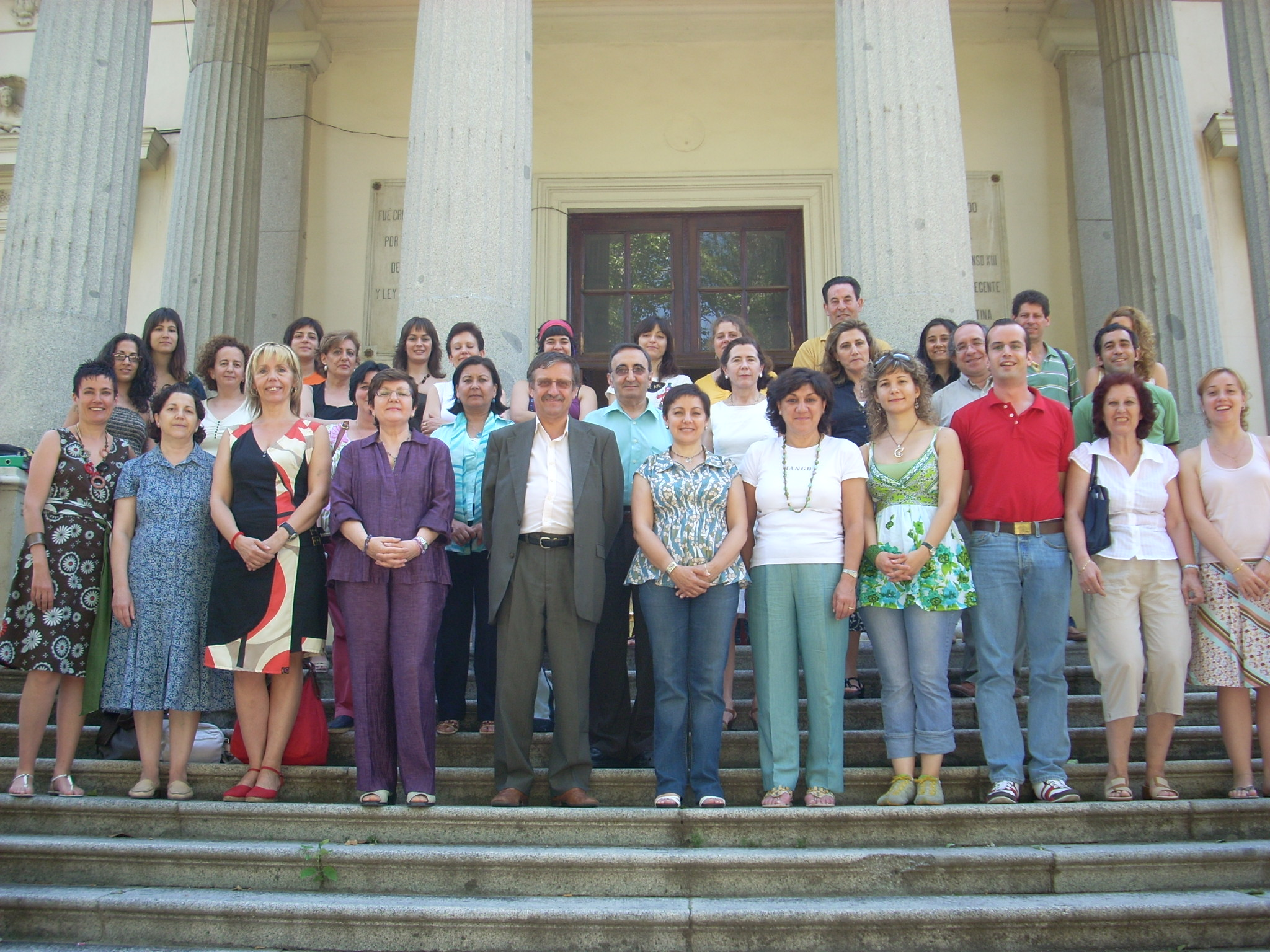 Maestros y personal docente del Centro Público de Educación Especial "María Soriano"